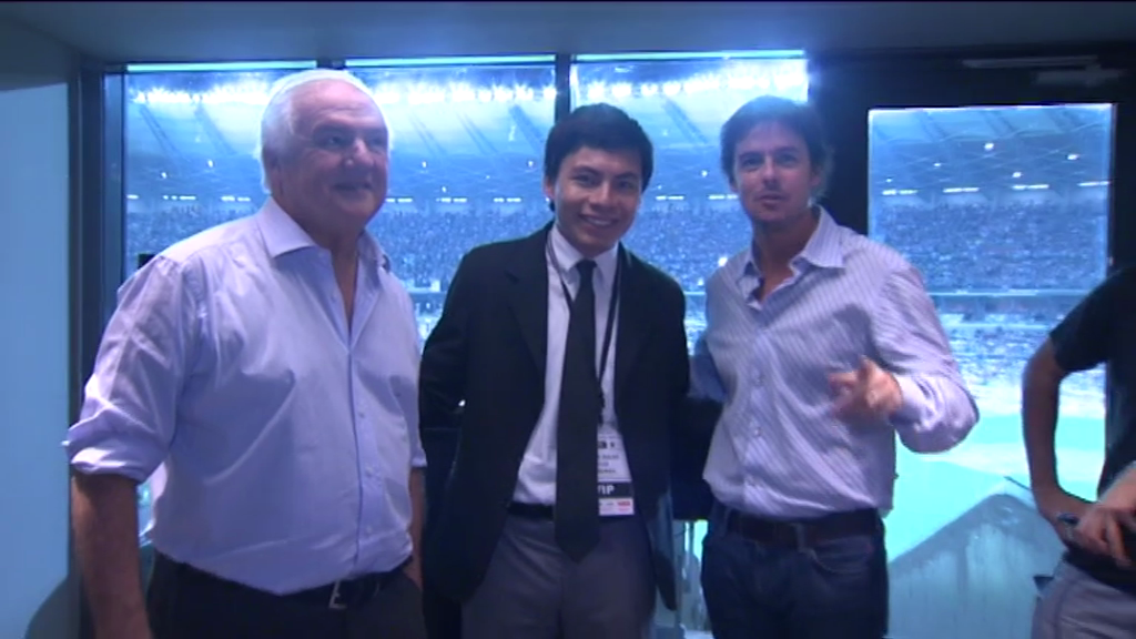 Fernando Niembro y Mariano Closs, apadrinando a Noe Vazquez